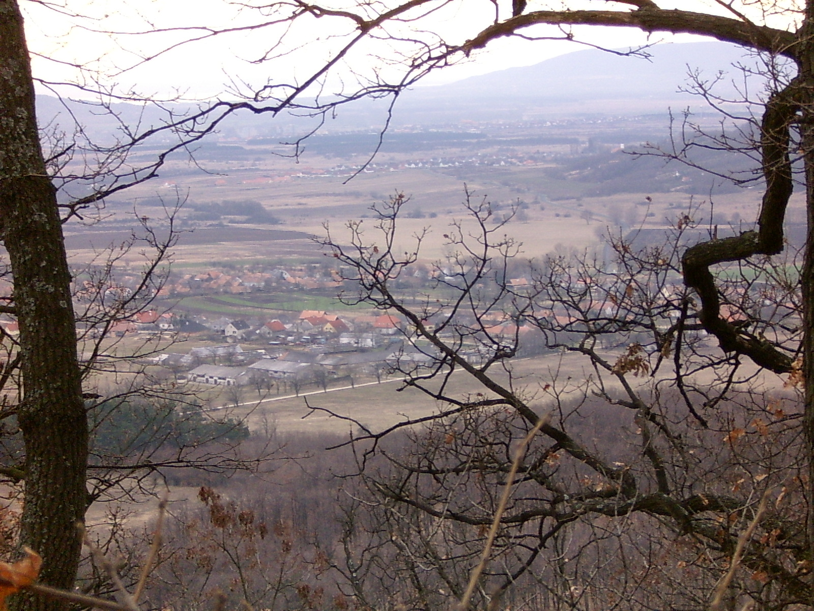 Sáska felülről